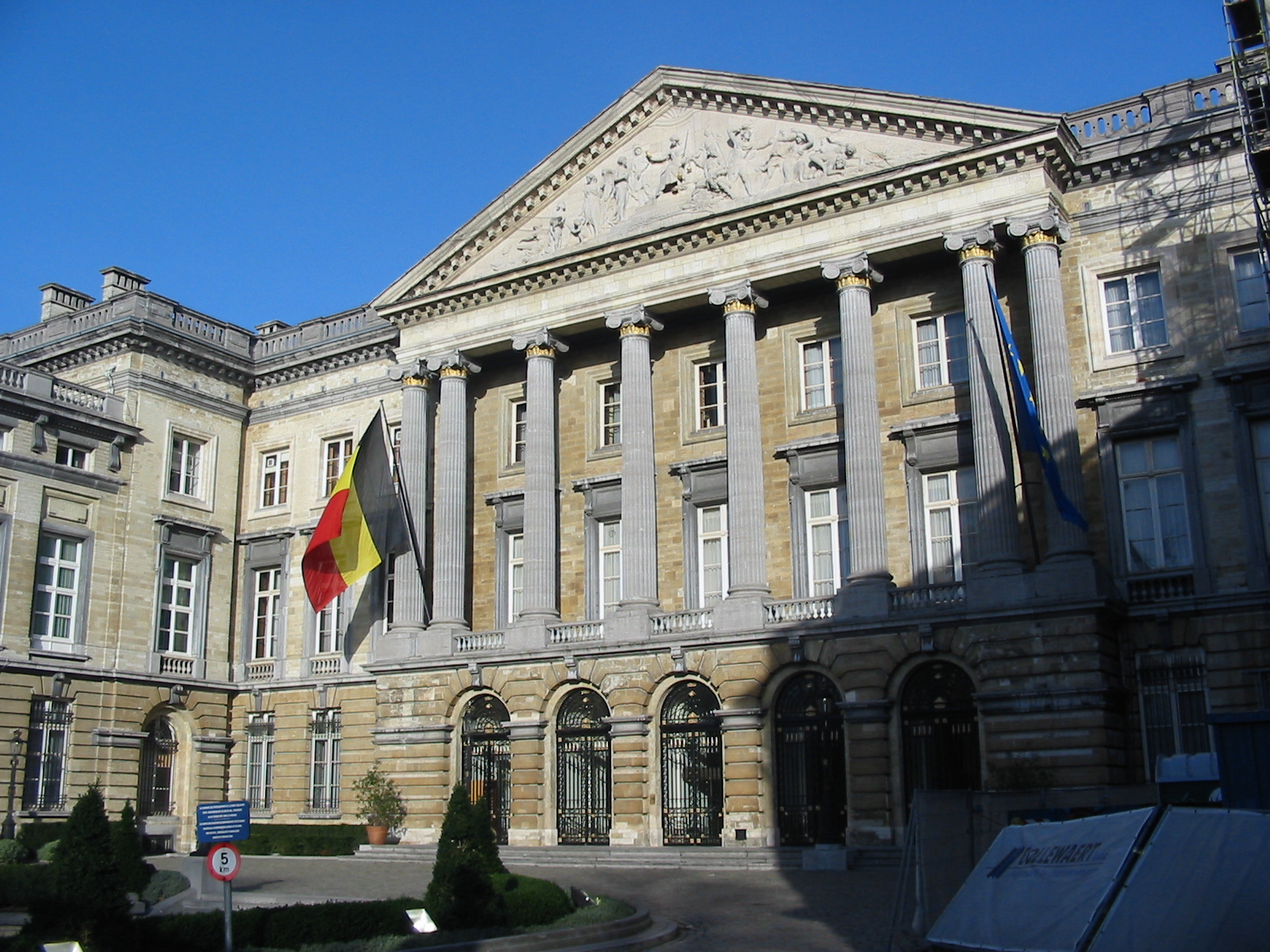 Belgian Senate building, Brussels